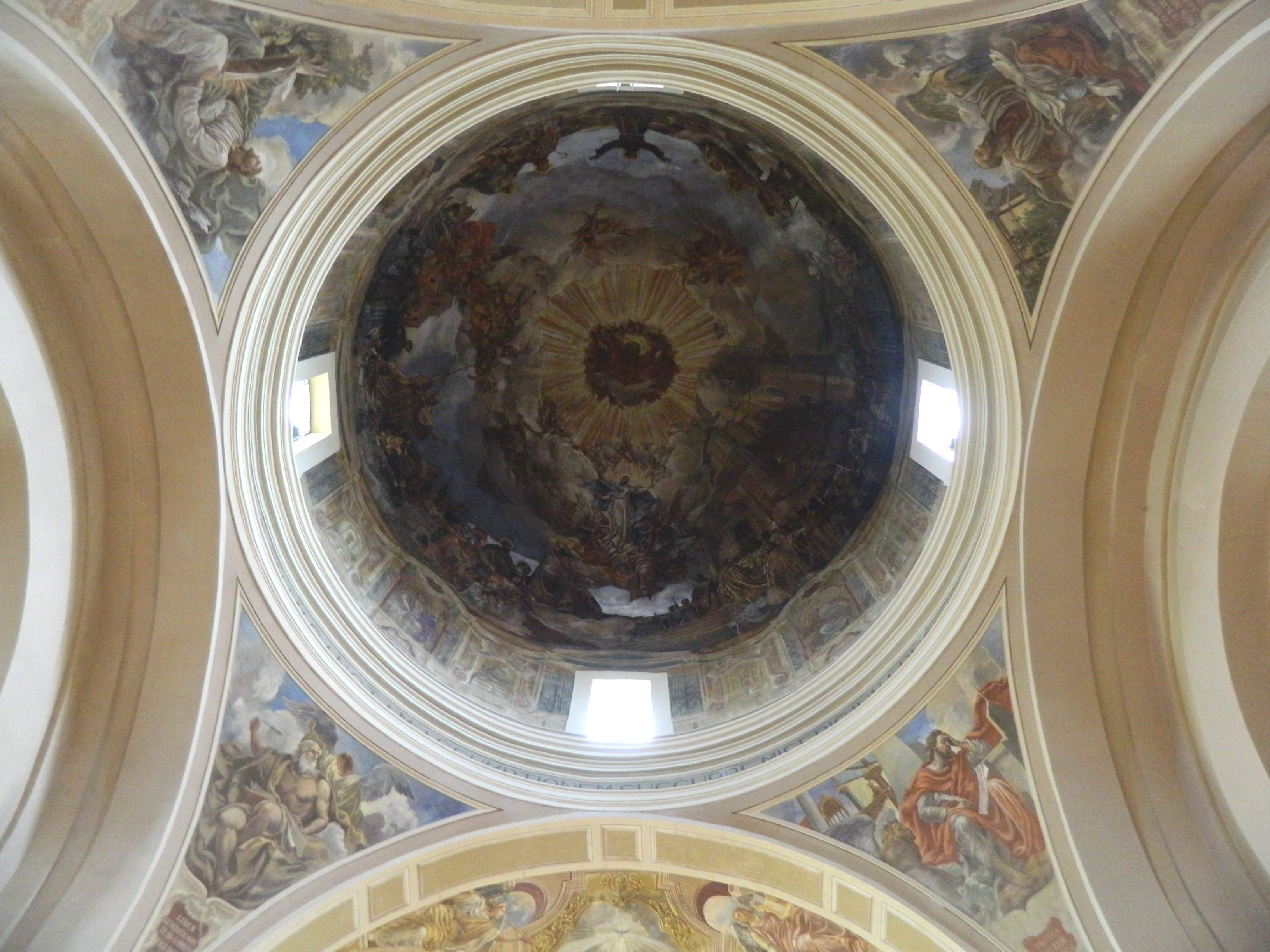 Cattedrale di San Gerardo (Potenza) - Cupola